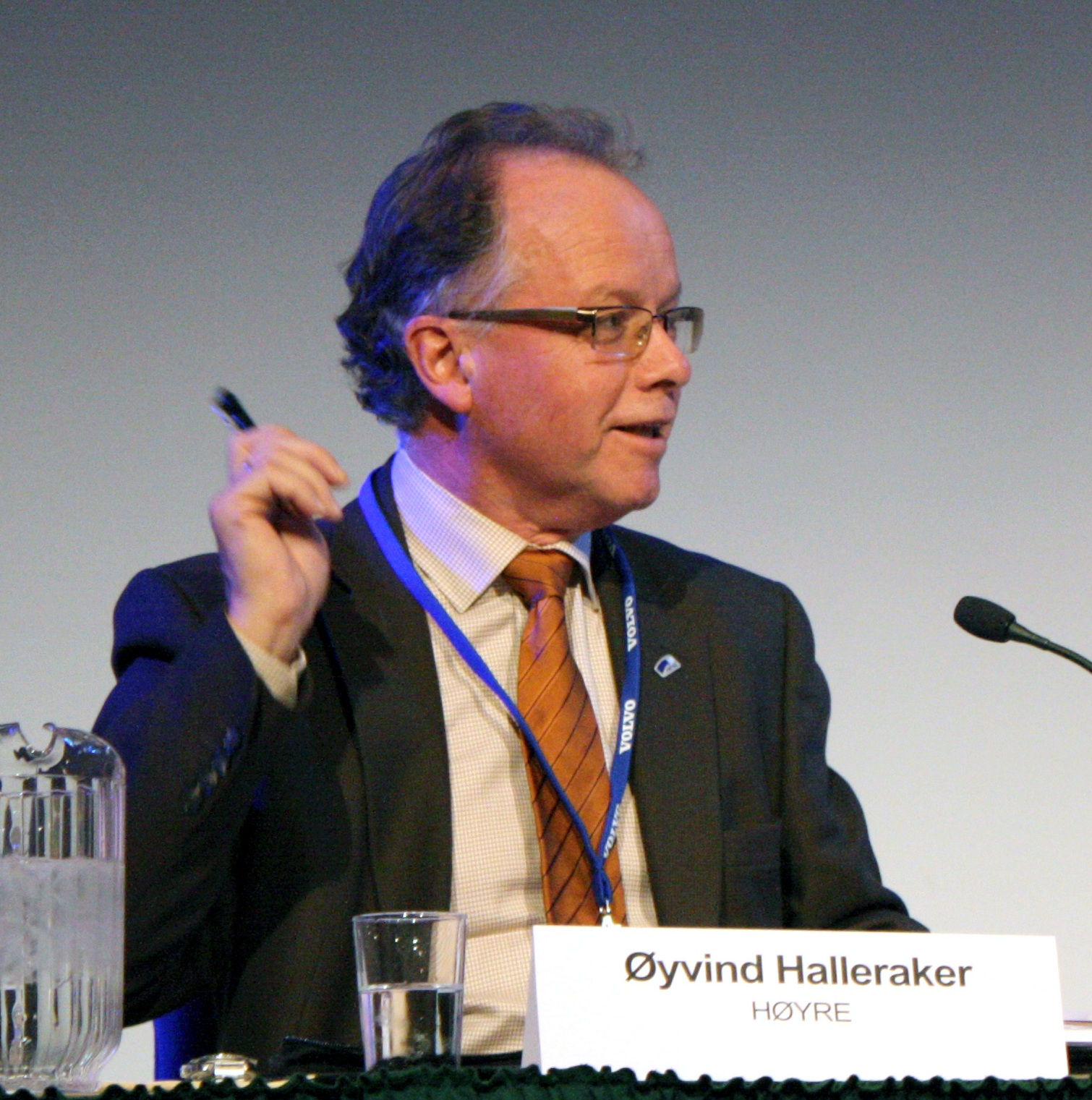 Øyvind Halleraker (Høyre) i transportkomiteens debatt under konferansen Transport og Logistikk 2010.